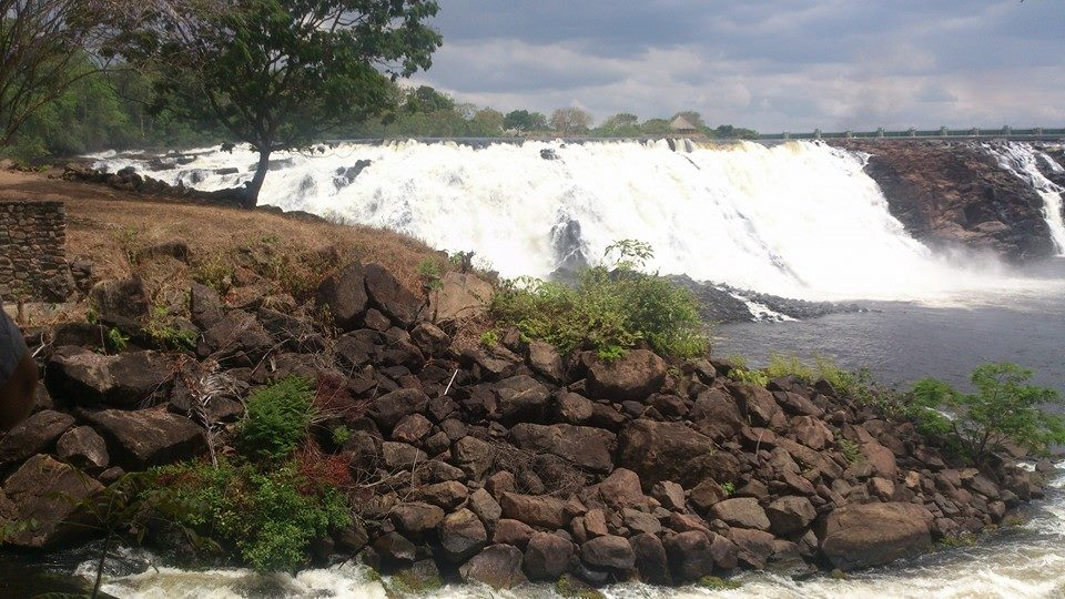 parque la llovizna